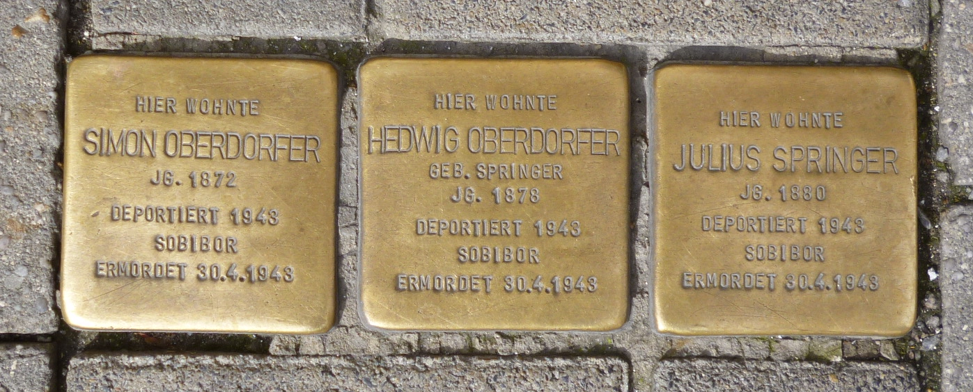 Stolpersteine von Simon Oberdorfer, Hedwig Oberdorfer und Julius Springer, verlegt in Regensburg (Oberpfalz)